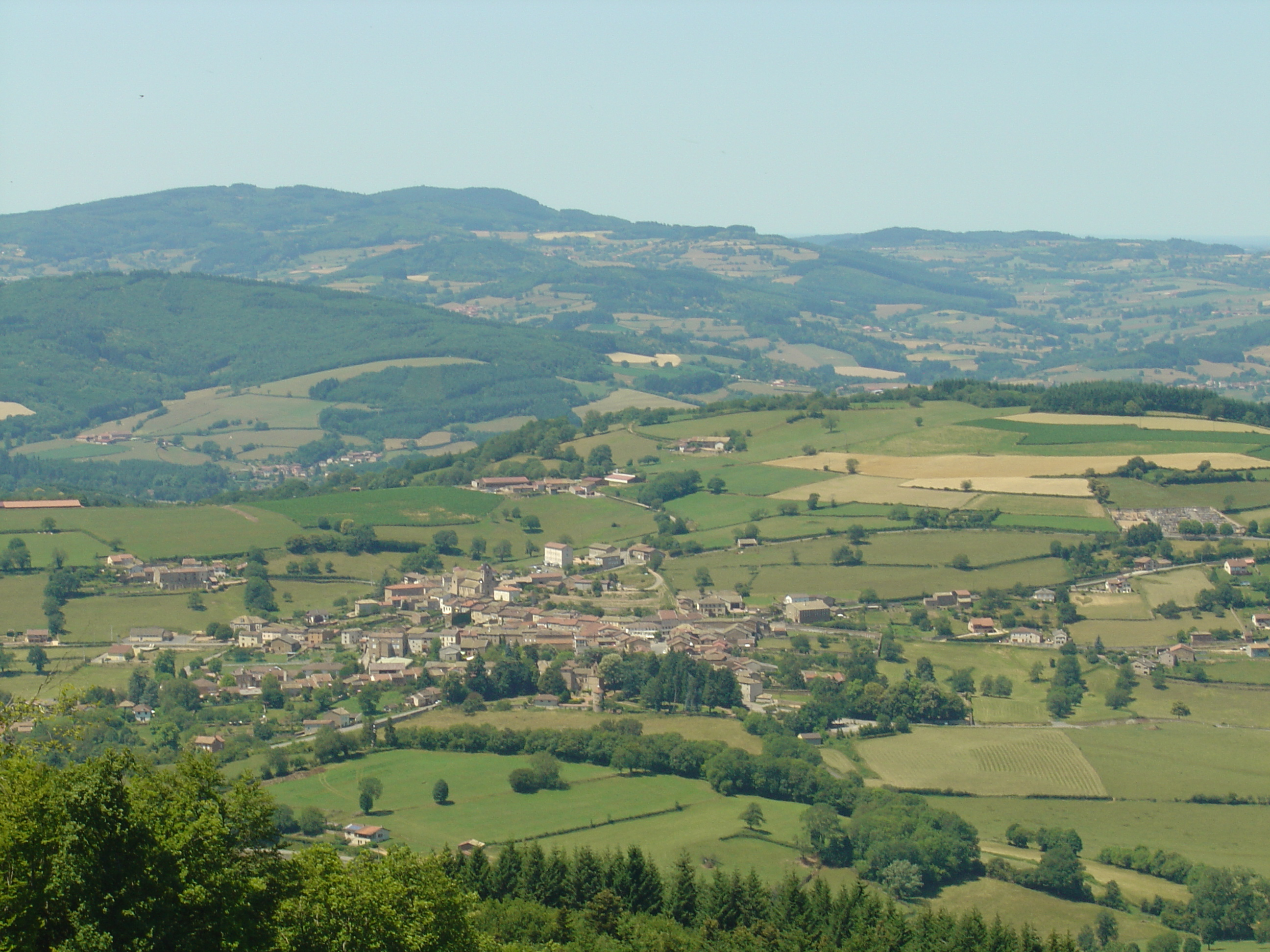 Village de Tramayes vu depuis le signal de la Mère Boîtier (758m)